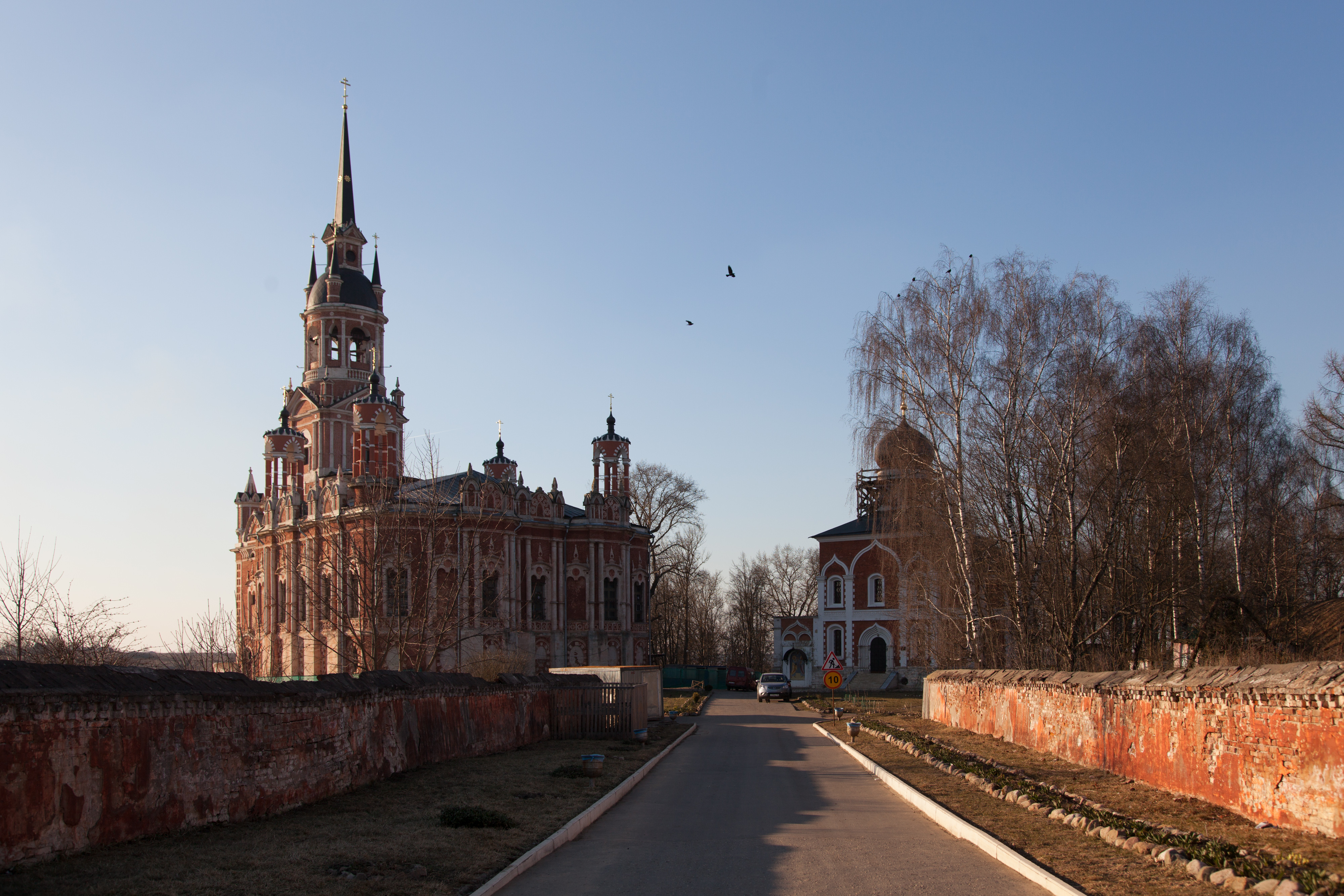 Ансамбль Можайского кремля (Москва и Московская область, Можайск, улица Бородинская, 8,9)